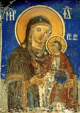 Τοιχογραφία του νάρθηκα με την Παναγία και τον Χριστό, περ. 1900, Σαμαρίνα, Προφήτης Ηλίας